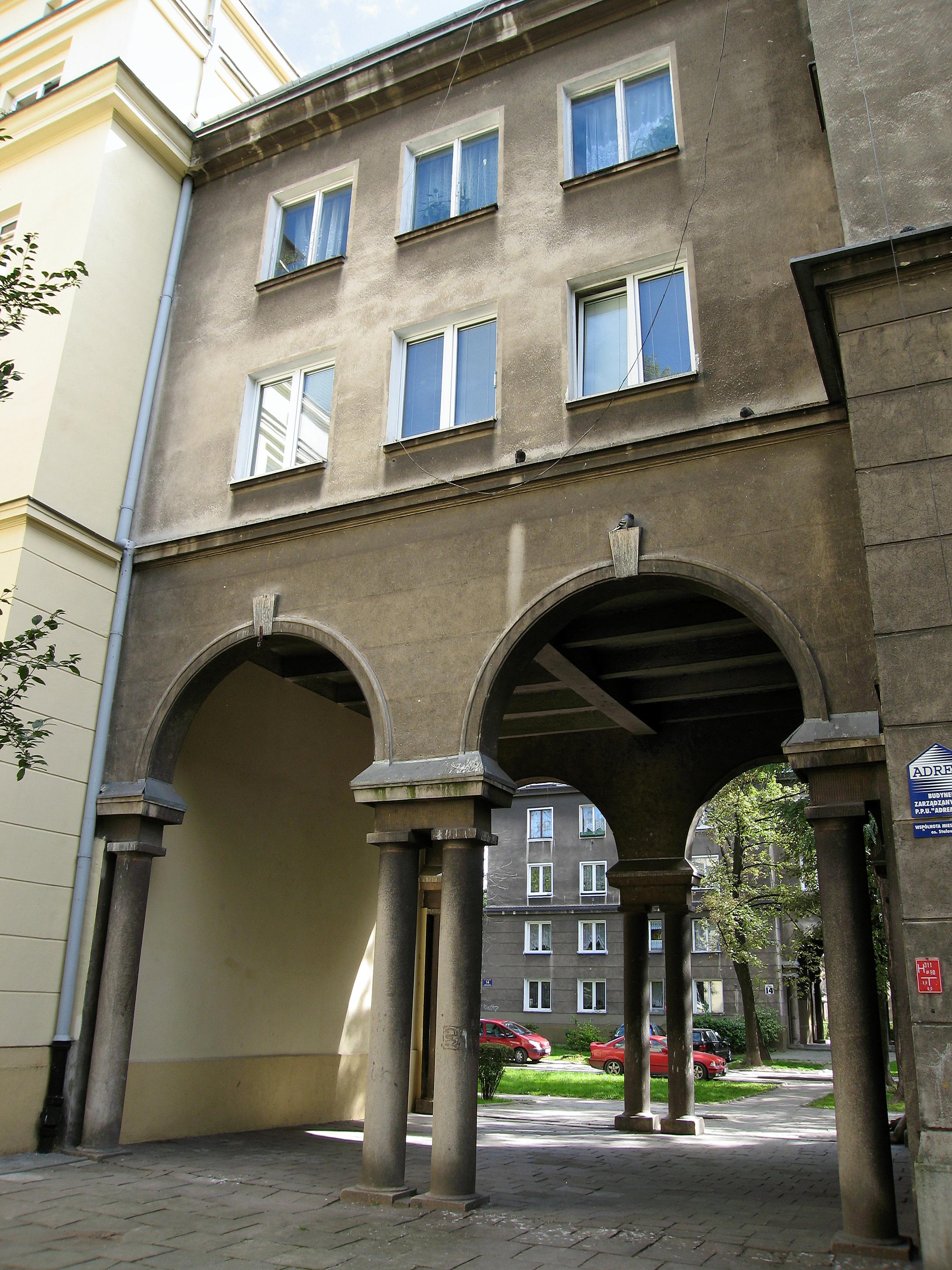 Nowa Huta osiedle Stalowe - Brama